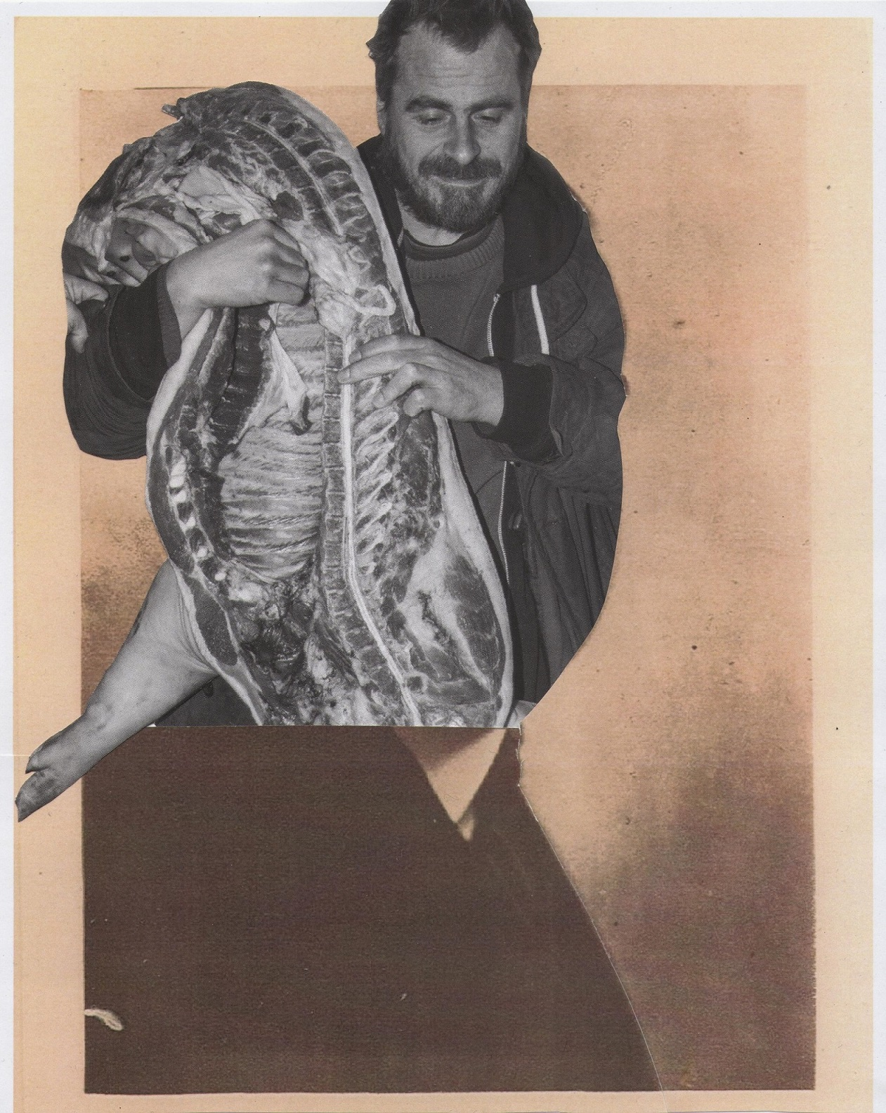 Kellermann Viktória kollázsa a 2016-os Csáth Géza-díjas kabai lórántról. A felhasznált portré Oláh Gergely Máté munkája.